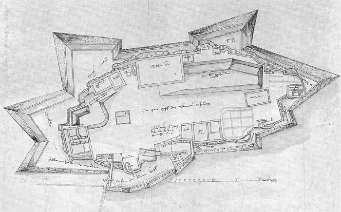 Schloss Lenzburg: Nie ausgeführtes Festungsprojekt von 1628. Entworfen von Valentin Friedrich.